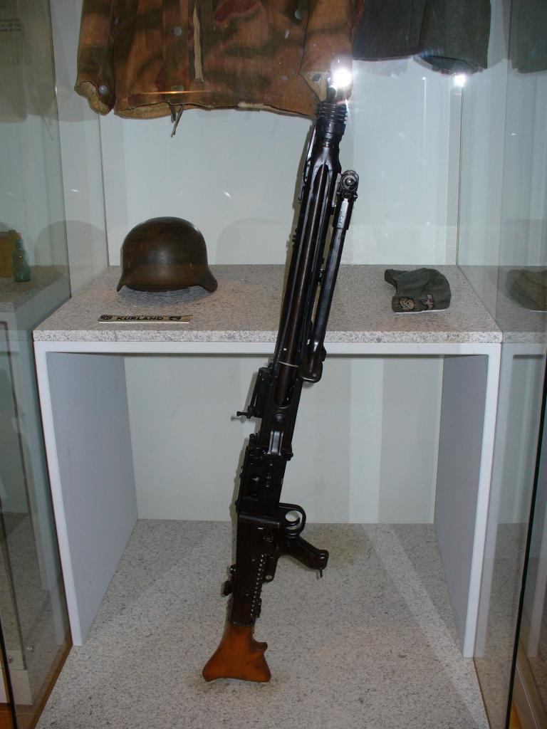 MG 42, German standard machine gun WWII